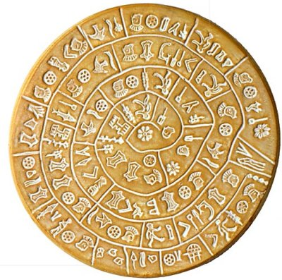 Phaistos Disk, bewerking van foto op engelse wikipedia .